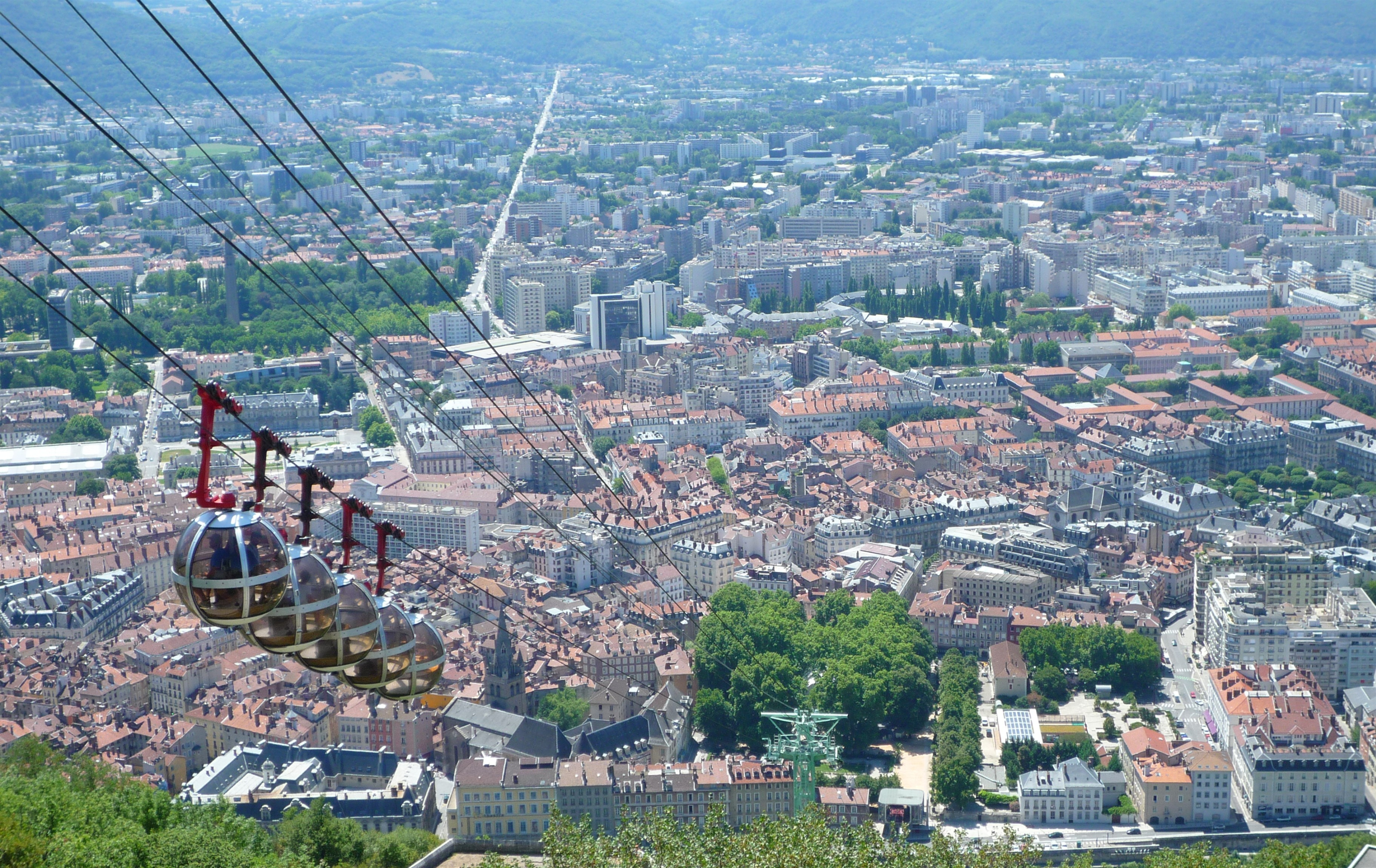 Téléphérique de Grenoble Bastille près de sa gare d'arrivée.